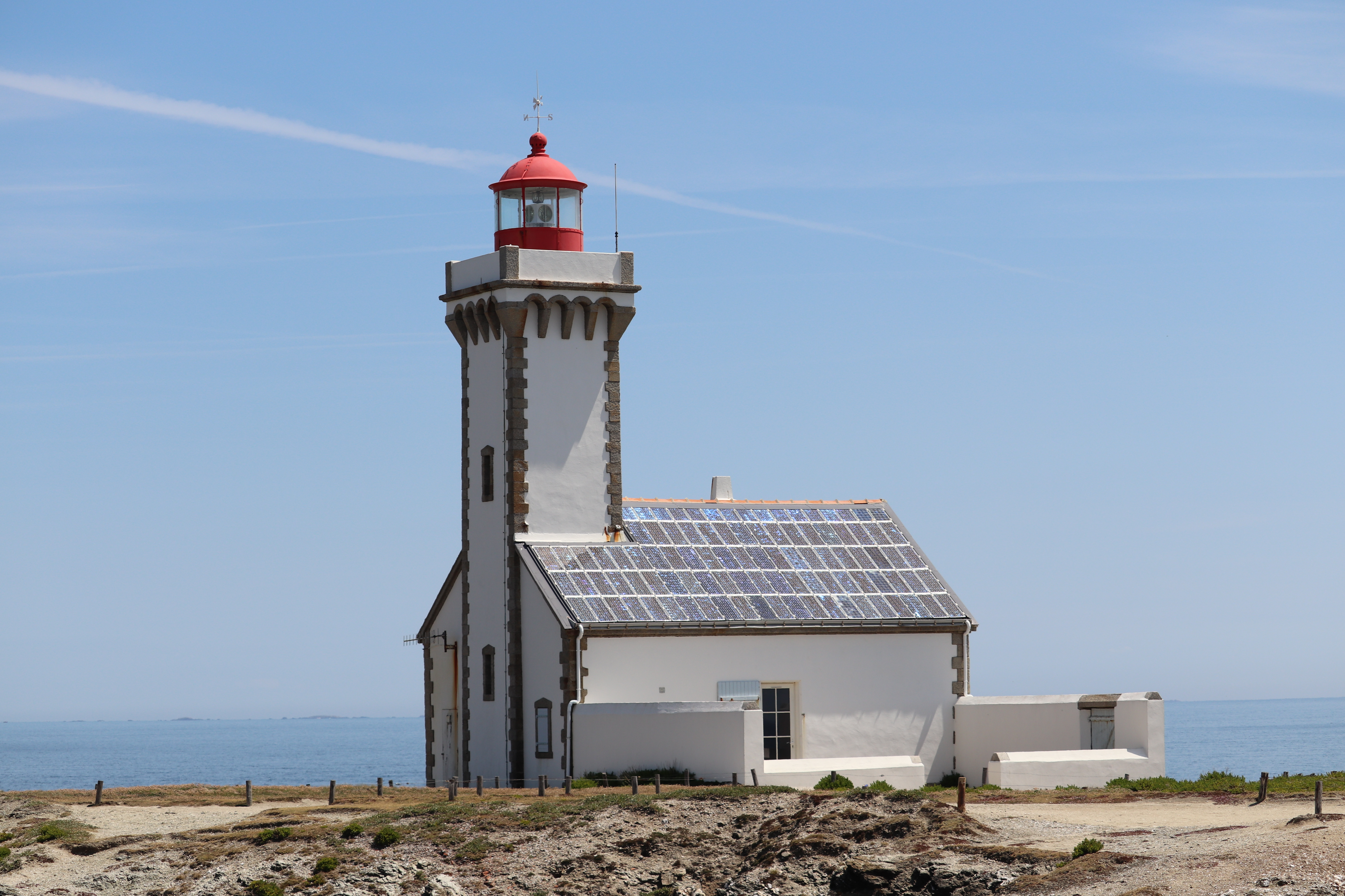 Vue latérale du phare de la Pointe des Poulains, Belle-Île